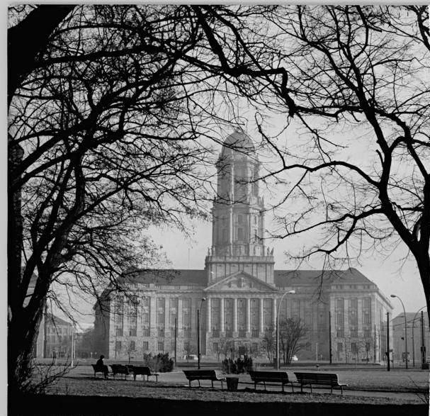 Berlin, Stadthaus Zentralbild Link hsch-Schä 15.4.1963 DDR: Berlin Blick auf das Alte Stadthaus in der Kosterstraße in dem die Amtsräume des Ministerrates der Deutschen Demokratischen Republik untergebracht sind.